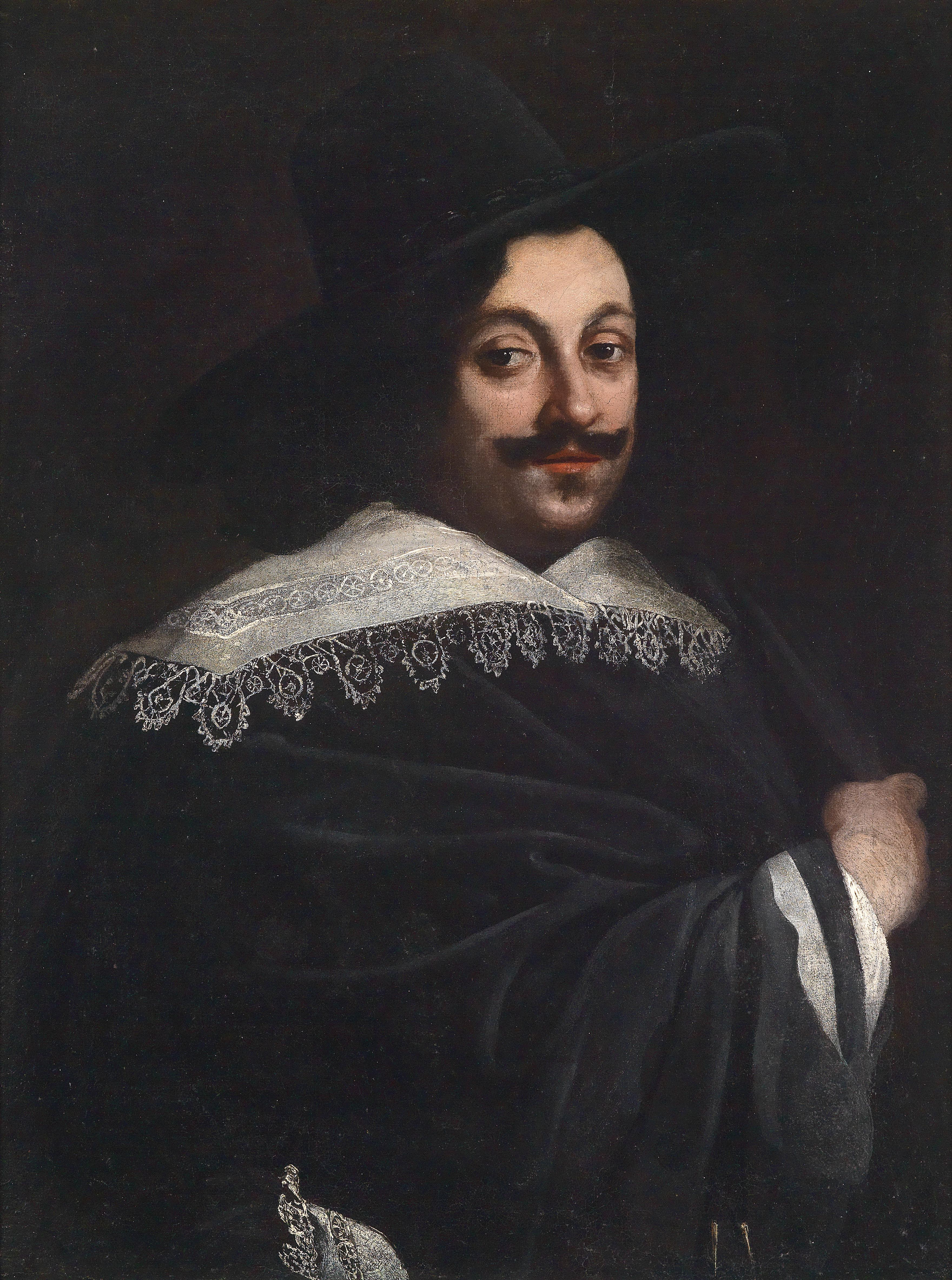 Bildnis eines Adeligen